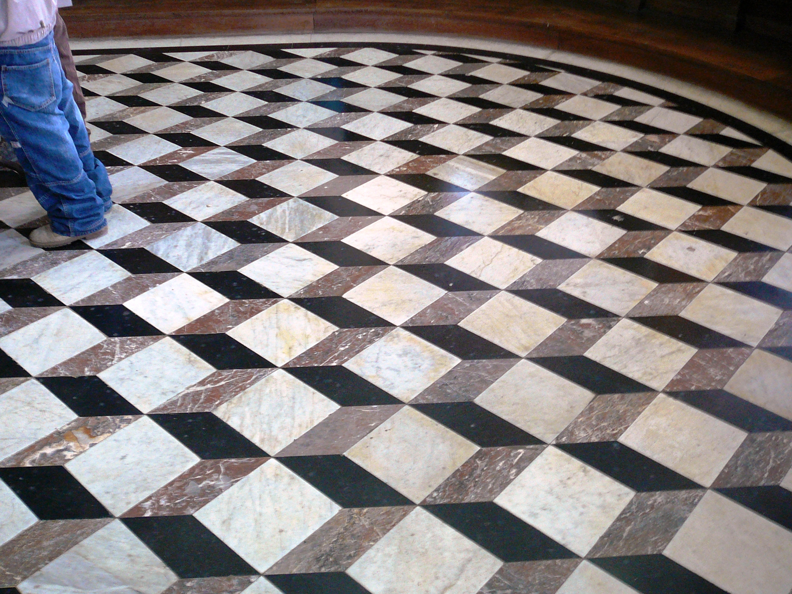 Dallage du choeur de la cathédrale de Noyon Auteur : So Leblanc, 2007